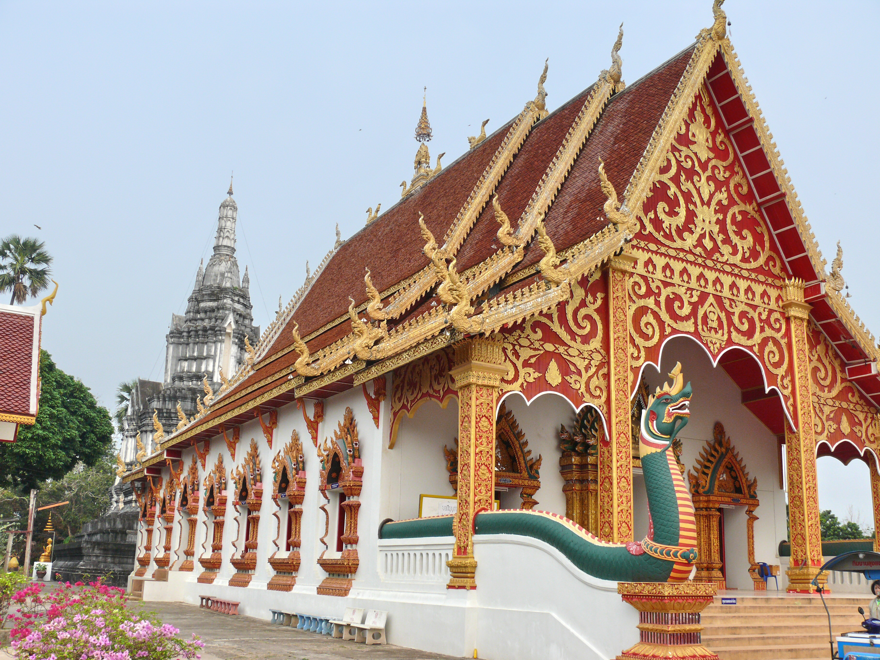 Wat_Suan_Tan,_bôt,_Nan.jpg